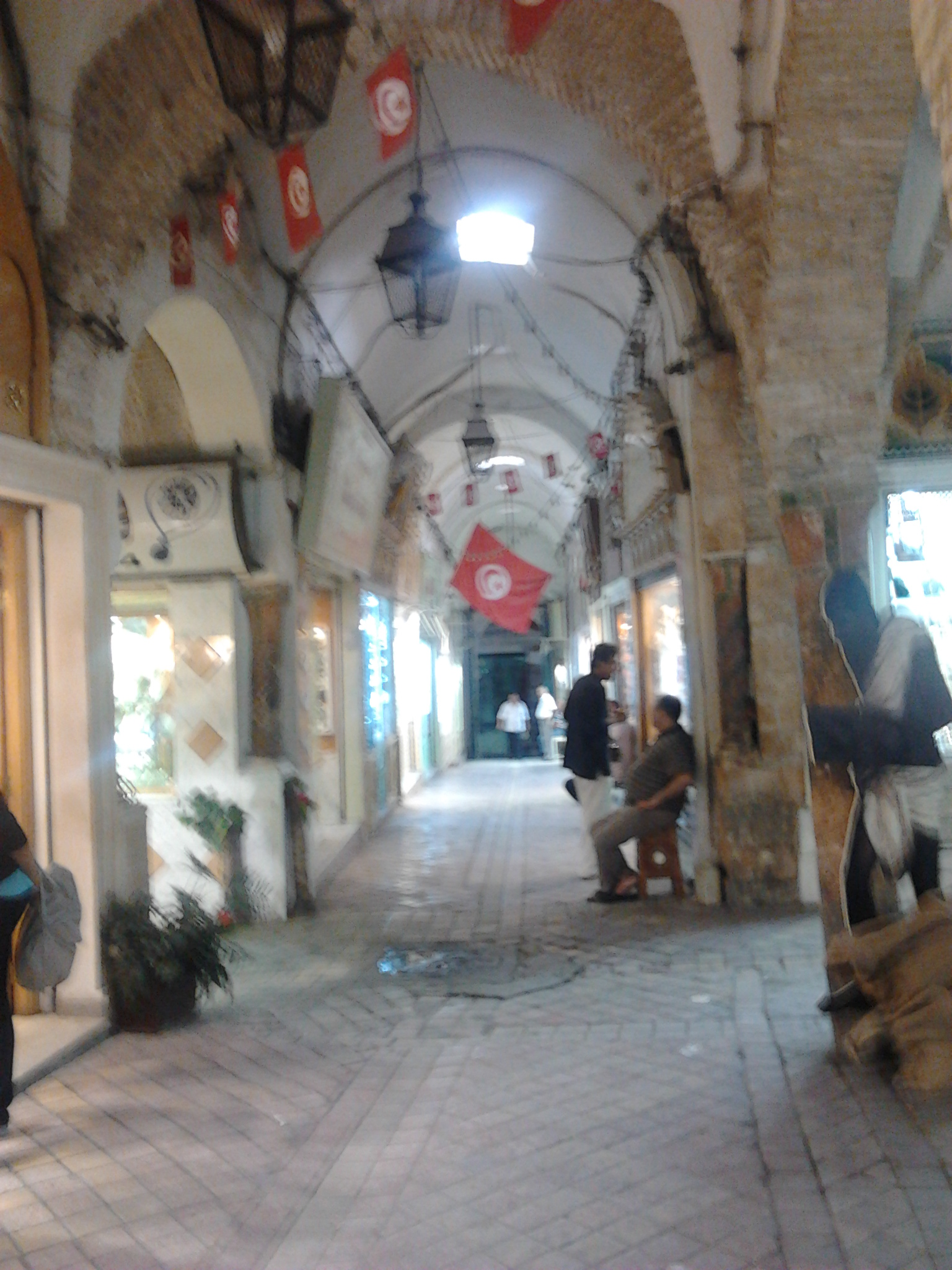 Souk El Berka - reconstitution d'une scène de vente d'esclave lors de l'evennement culturel "Dream city"